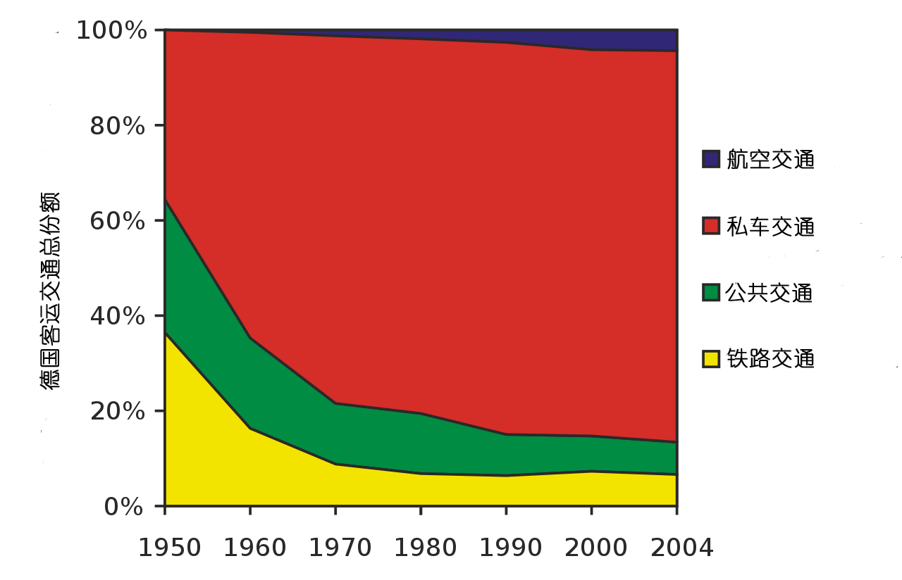 Anteil der verschiedenen Verkehrsträger (Personenverkehr) an der Verkehrsleistung in Deutschland